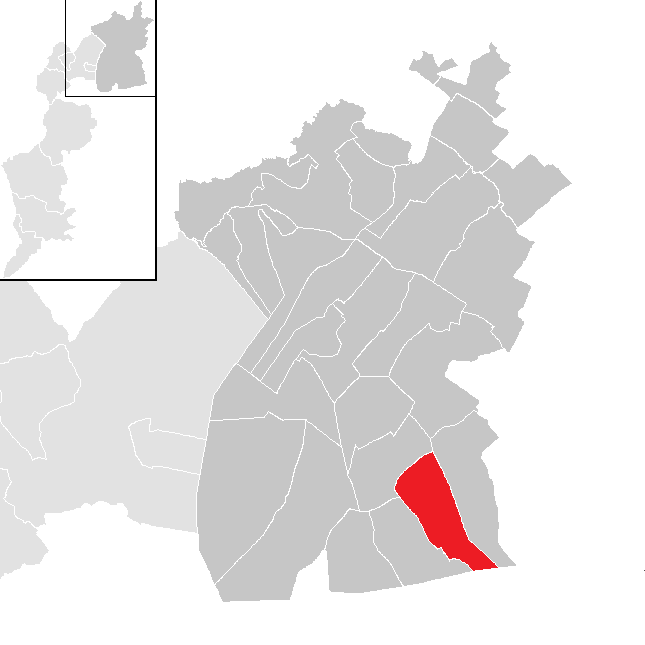 Bezirk Neudsiedl am See